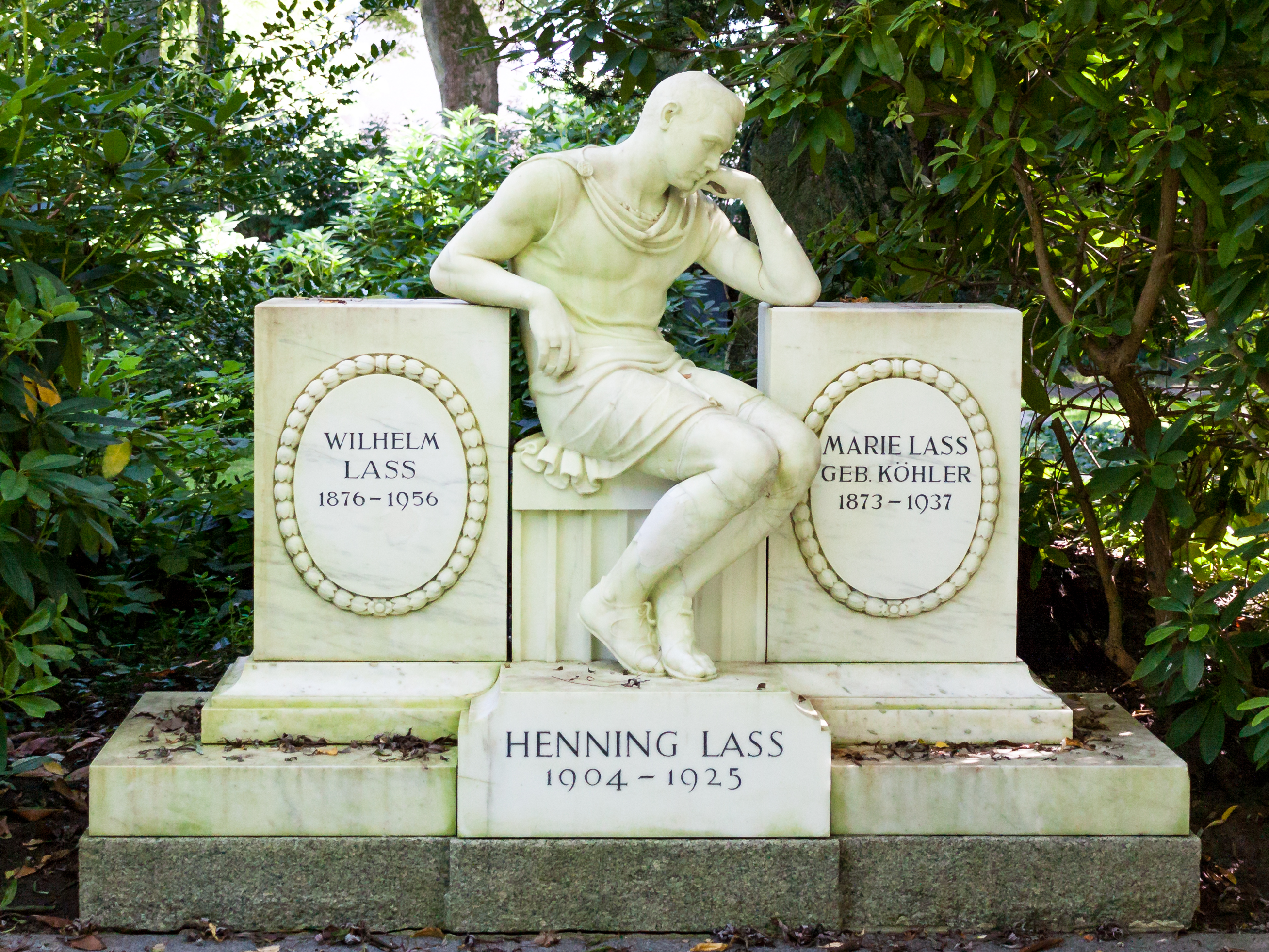 Marmorstatue eines Jünglings am Grab von Henning Lass. Die Eltern gaben das Grabmal bei Edvard Eriksen in Auftrag – dieser fertigte 1913 bereits die weltberühmte Figur der Kleinen Meerjungfrau für Kopenhagen. Das 1927 aufgestellte Grabmal ist Eriksens einziges öffentliches Werk in Deutschland.